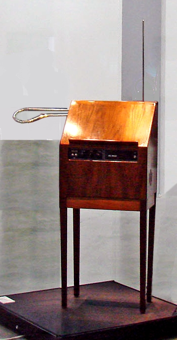 Big Briar Series 91 : MODEL 91A